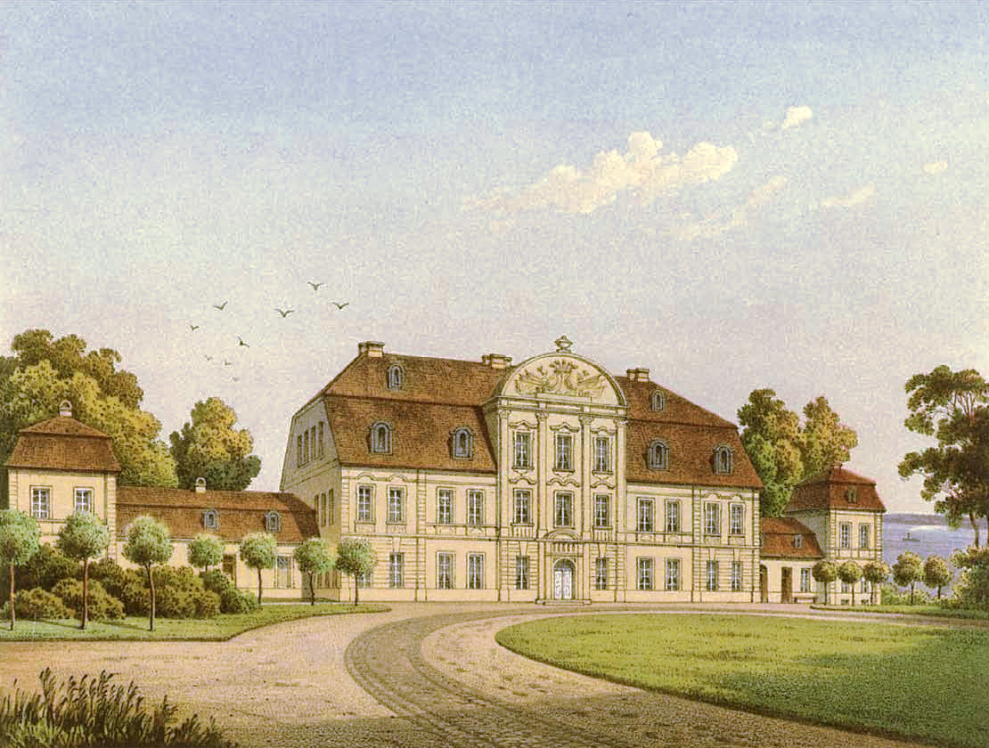 Schloss Cummerow, Kreis Demmin, Provinz Pommern